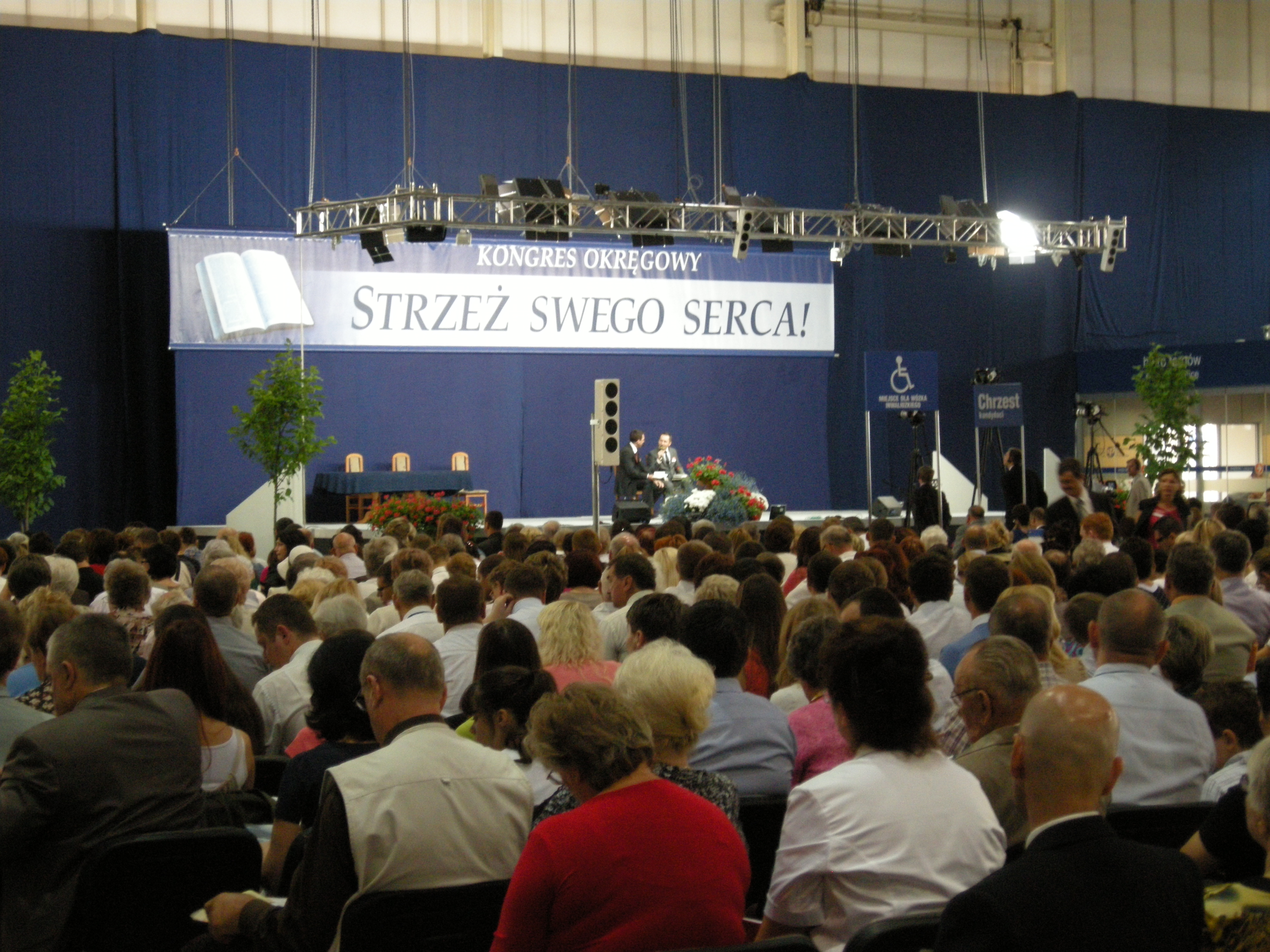 Zgromadzenie okręgowe w Poznaniu "Strzeż swego serca!". 2012